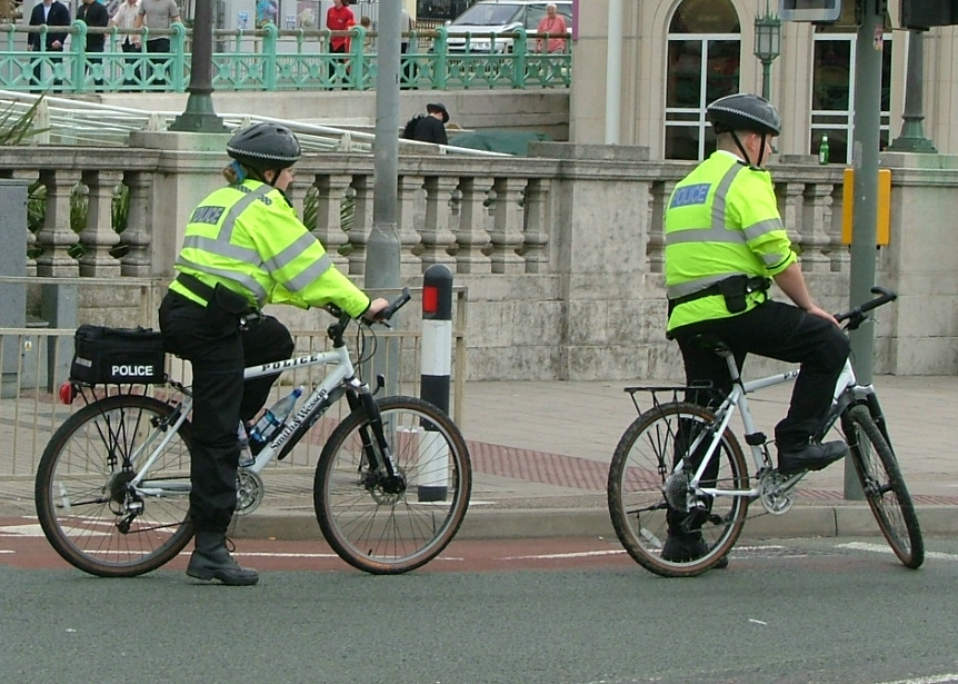 Police bicycles